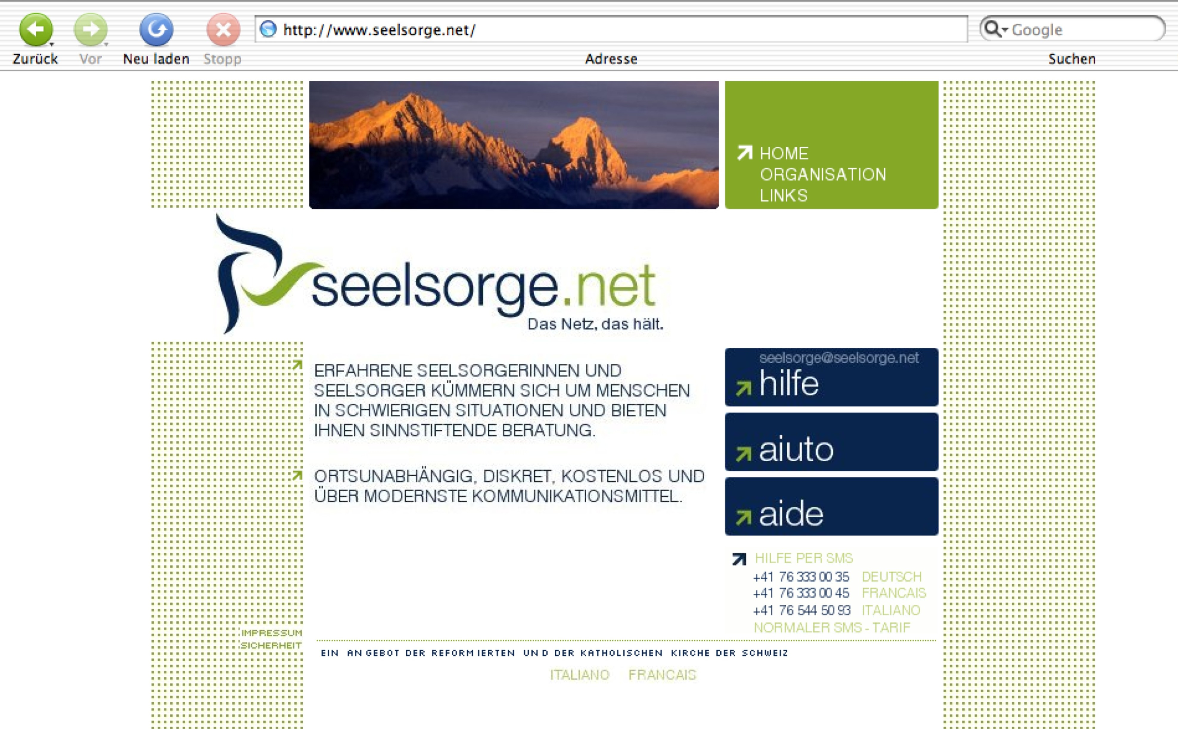 Der Internet-Auftritt der ökumenischen Internet-Seelsorge der Schweizer Kirchen wurde im Jahre 2005 mit einem neuen Corporate Identity ausgestattet. - Foto: Jakob Vetsch, 16. Dezember 2006.